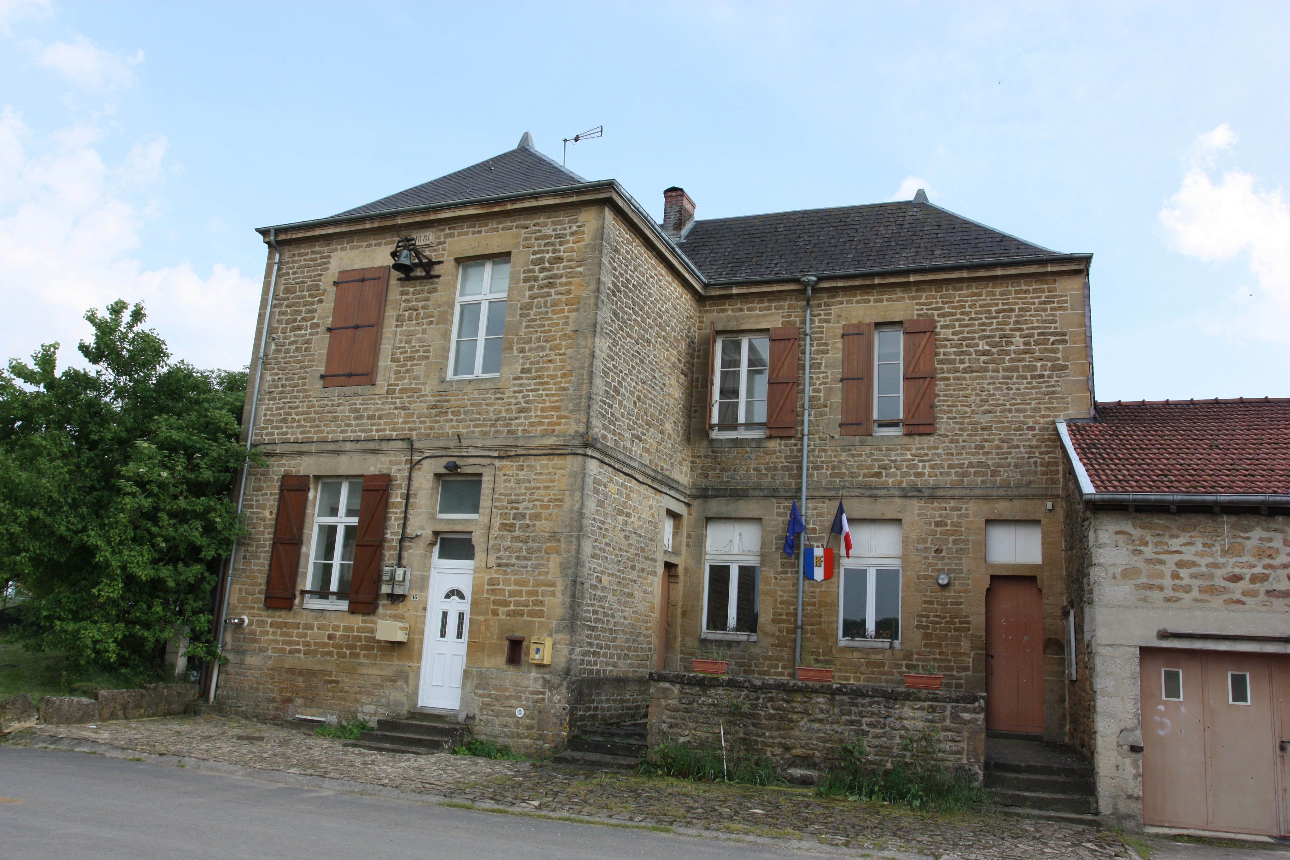 Signy-Montlibert la Mairie les Ardennes vues du sol photo Francis Neuvens